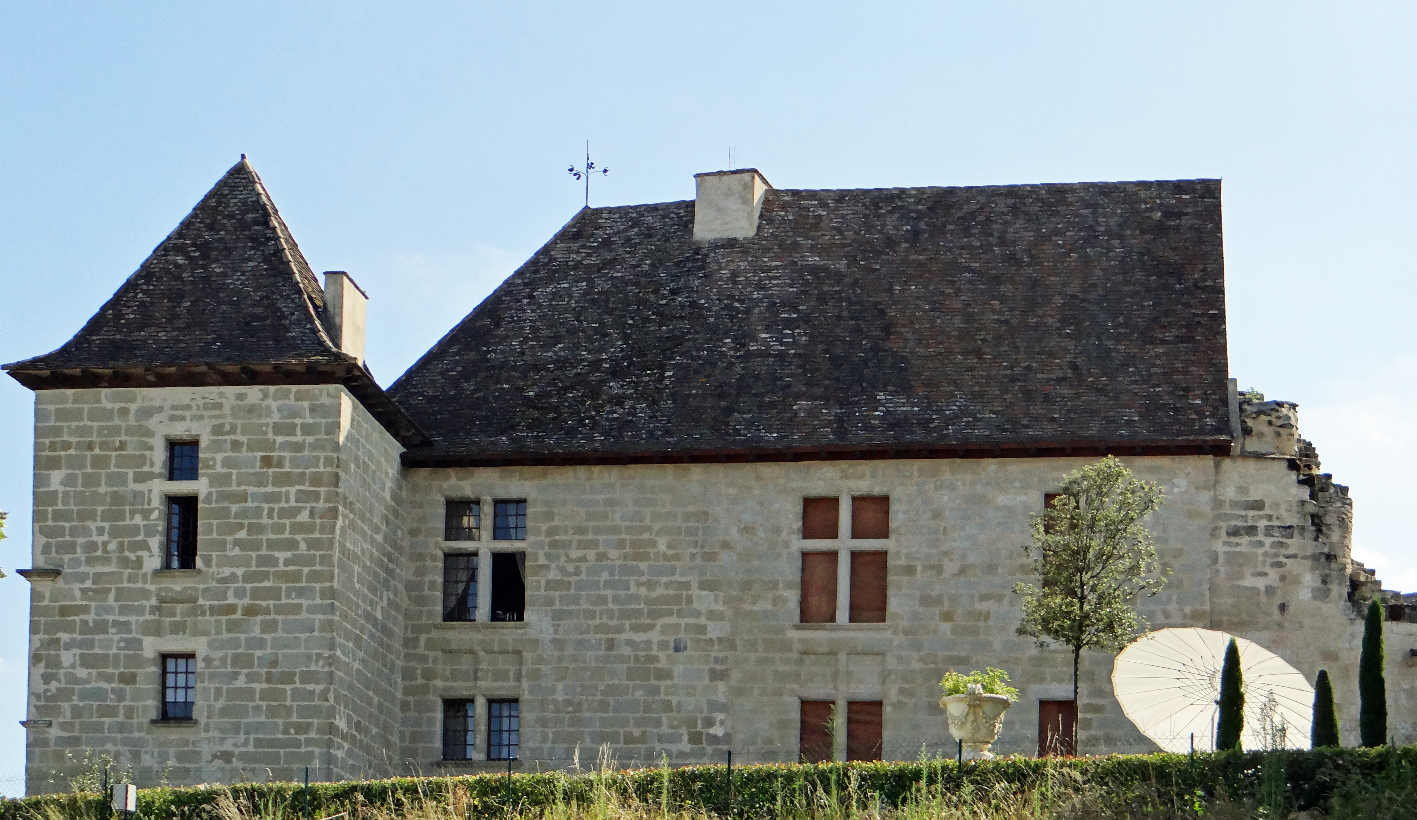 Verteuil-d'Agenais - Château de Verteuil